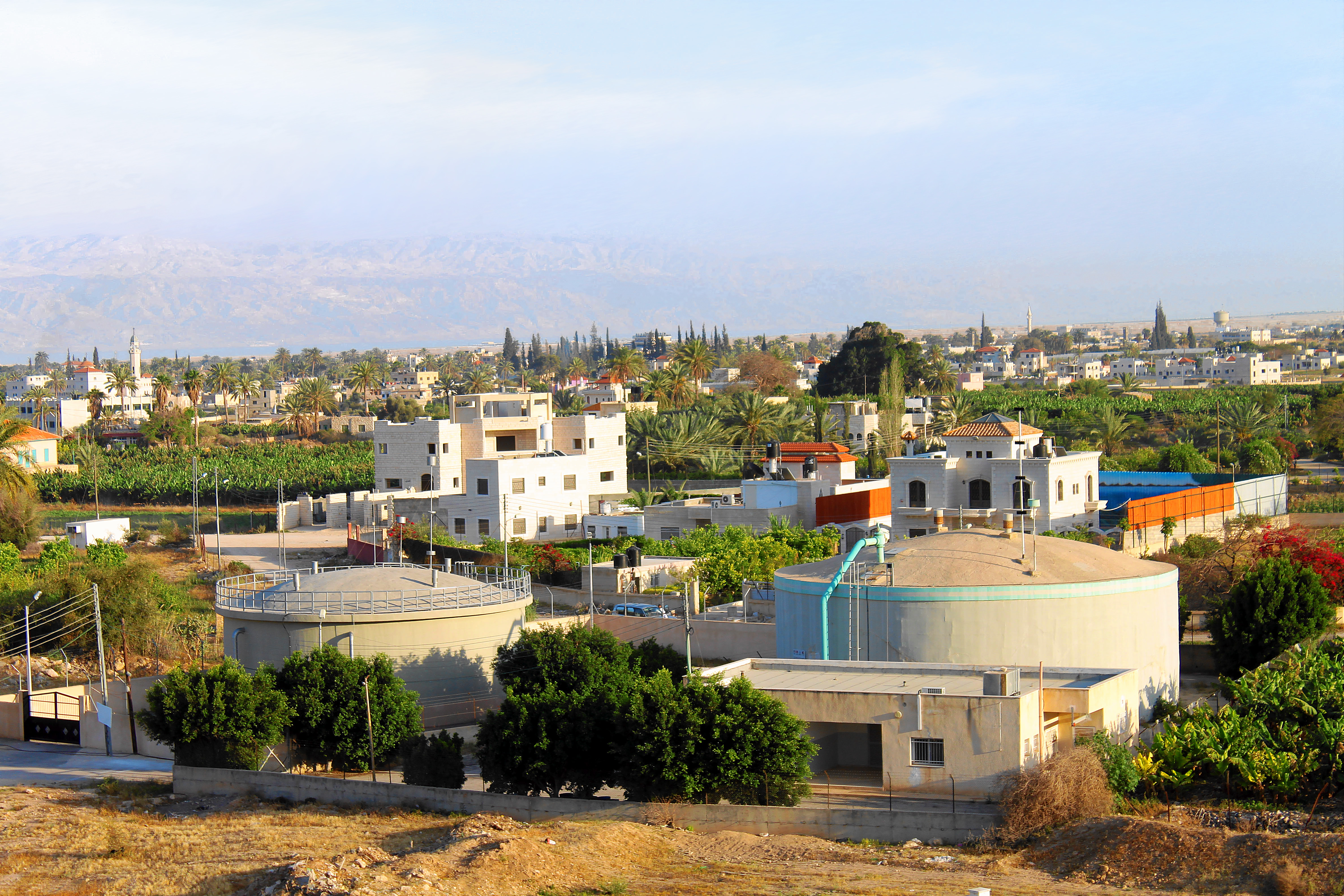 Panorama Jerycha.